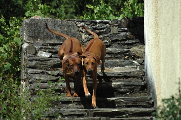 Rhodesian Ridgeback, zicht op de ridges. Categorie:Afbeelding hond